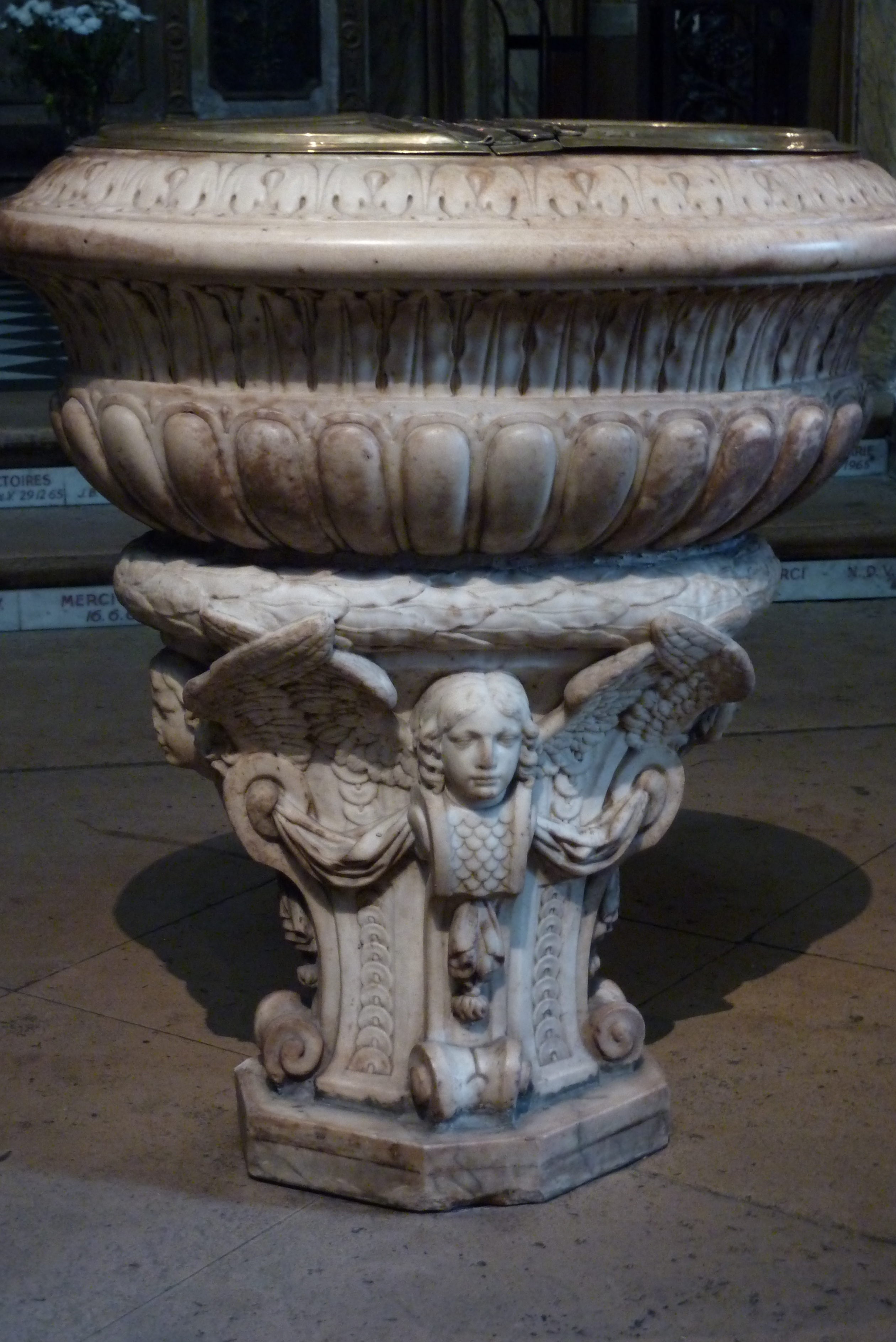 Taufbecken aus Marmor aus dem 17. Jahrhundert in der katholischen Pfarrkirche Notre-Dame-des-Victoires im 2. Arrondissement von Paris (Île-de-France/Frankreich)